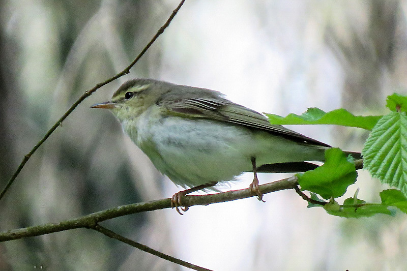 fluiter-2.jpg